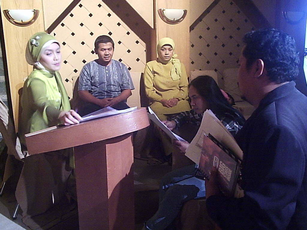 Produser Nasrul Ramadhan (kanan) mengarahkan Presenter Rieke Dyah Pitaloka (podium) dalam persiapan rekaman Catatan Sergap. Tampak dua orang narasumber tamu (di deretan bangku) dan Sutradara Satya Pakulangit (jongkok) mengikuti pengarahan. Picture taken in Studio 6, RCTI, Jakarta, Indonesia.